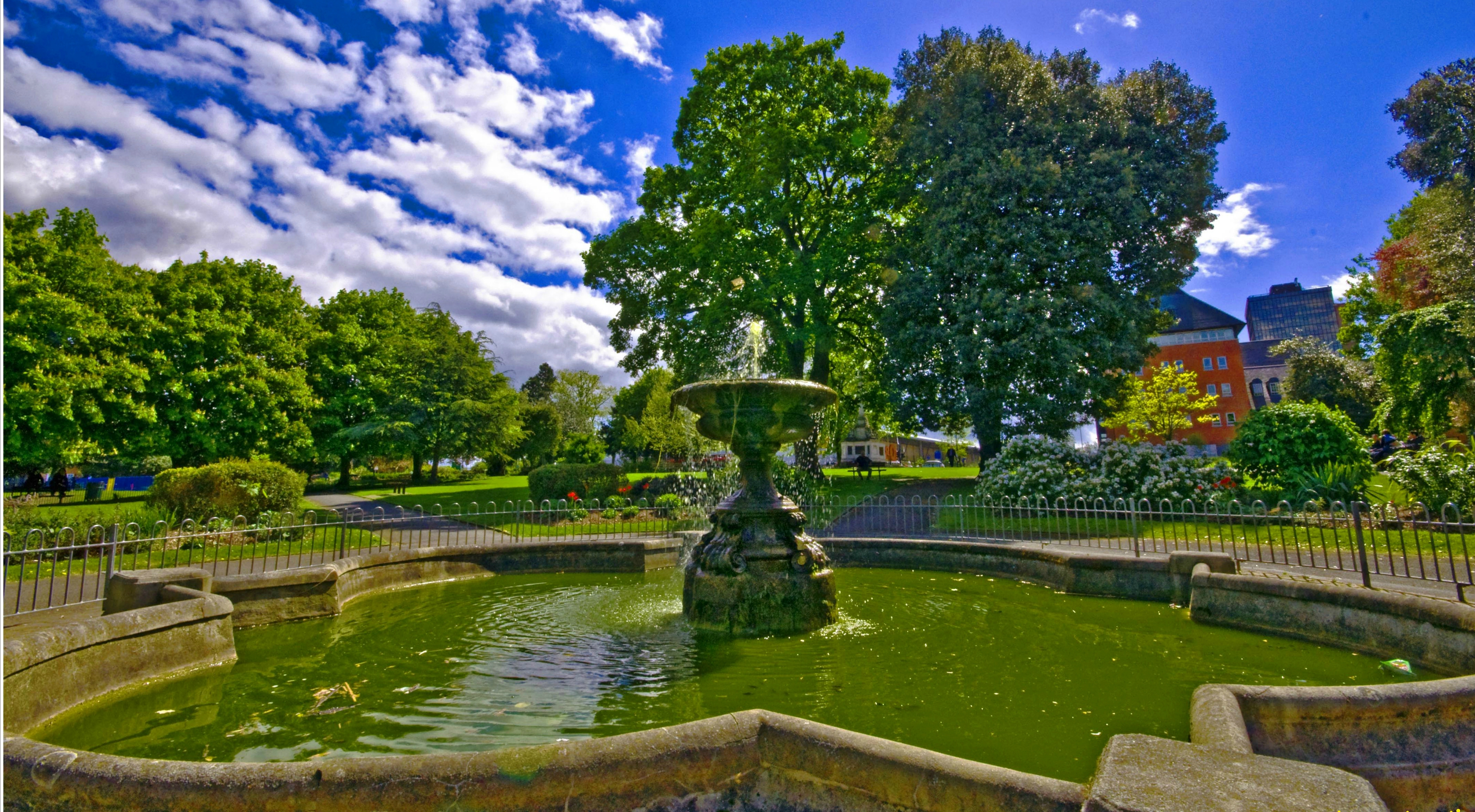 Sutton